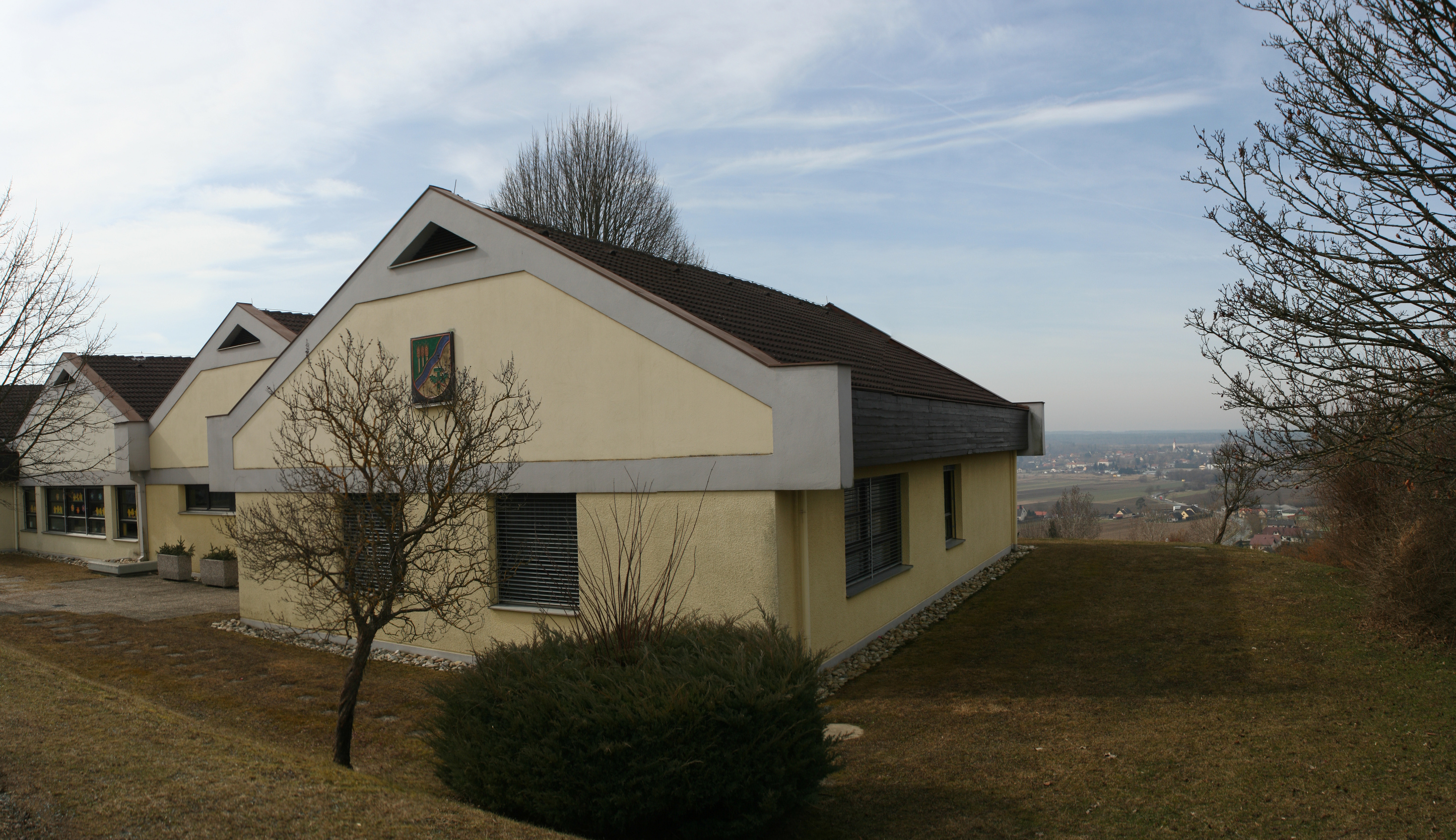 Burgauberg, Gemeindehaus; in the right background Burgaus is visible